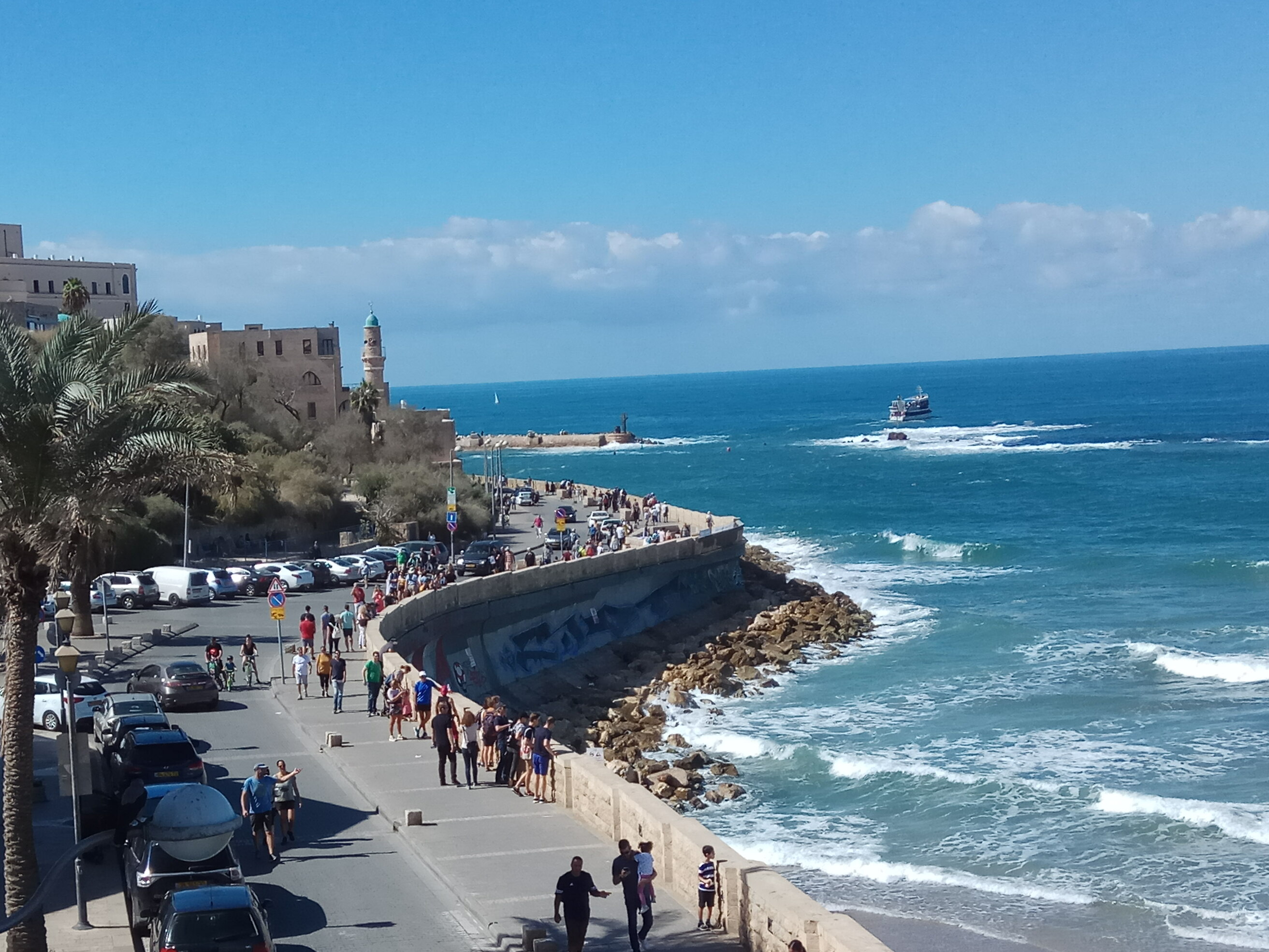 מבט על חוף יפו ממלון סטאי